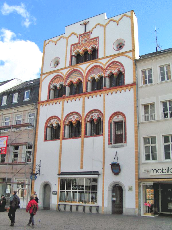 Dräikinnekshaus.